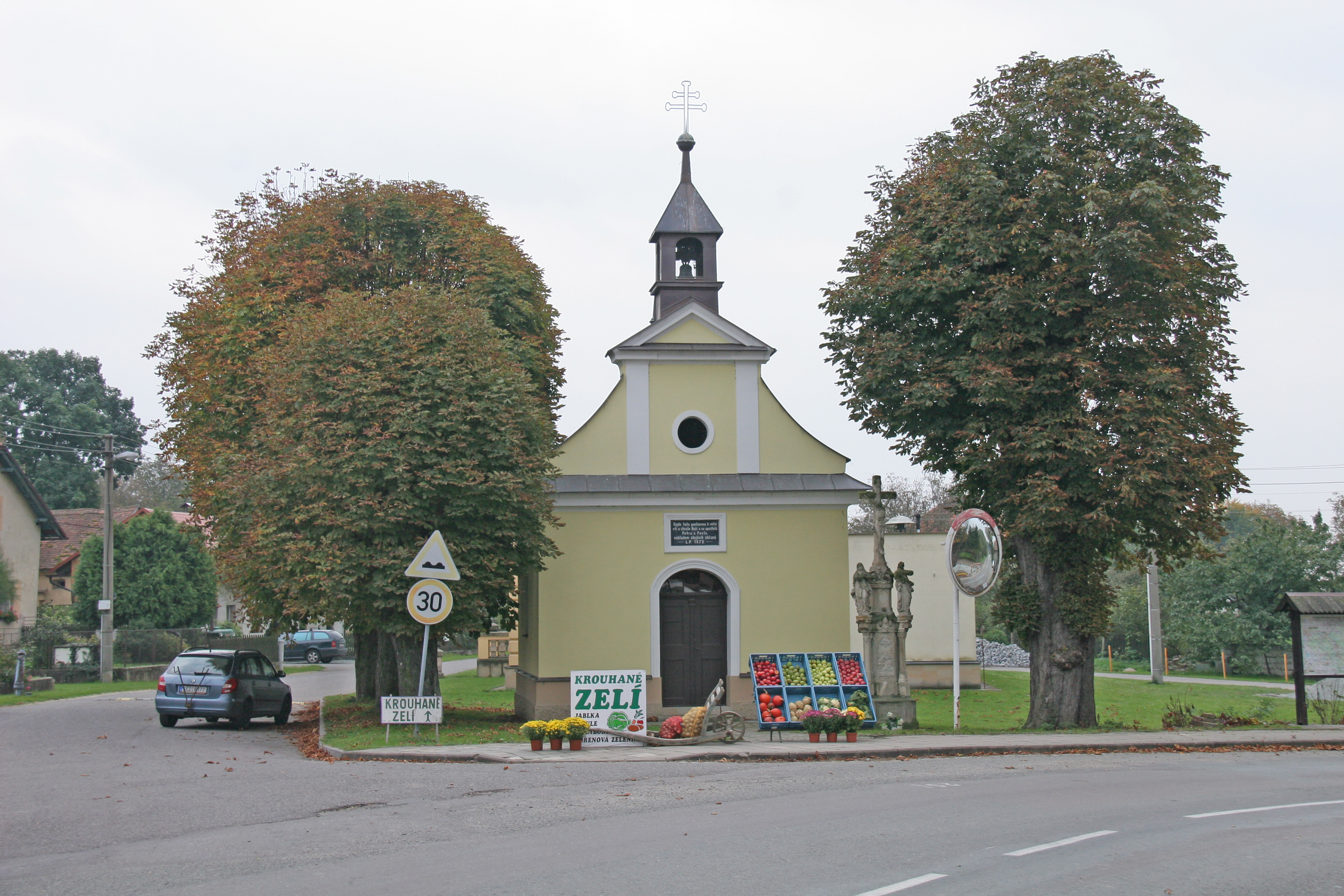 Očelice kaple